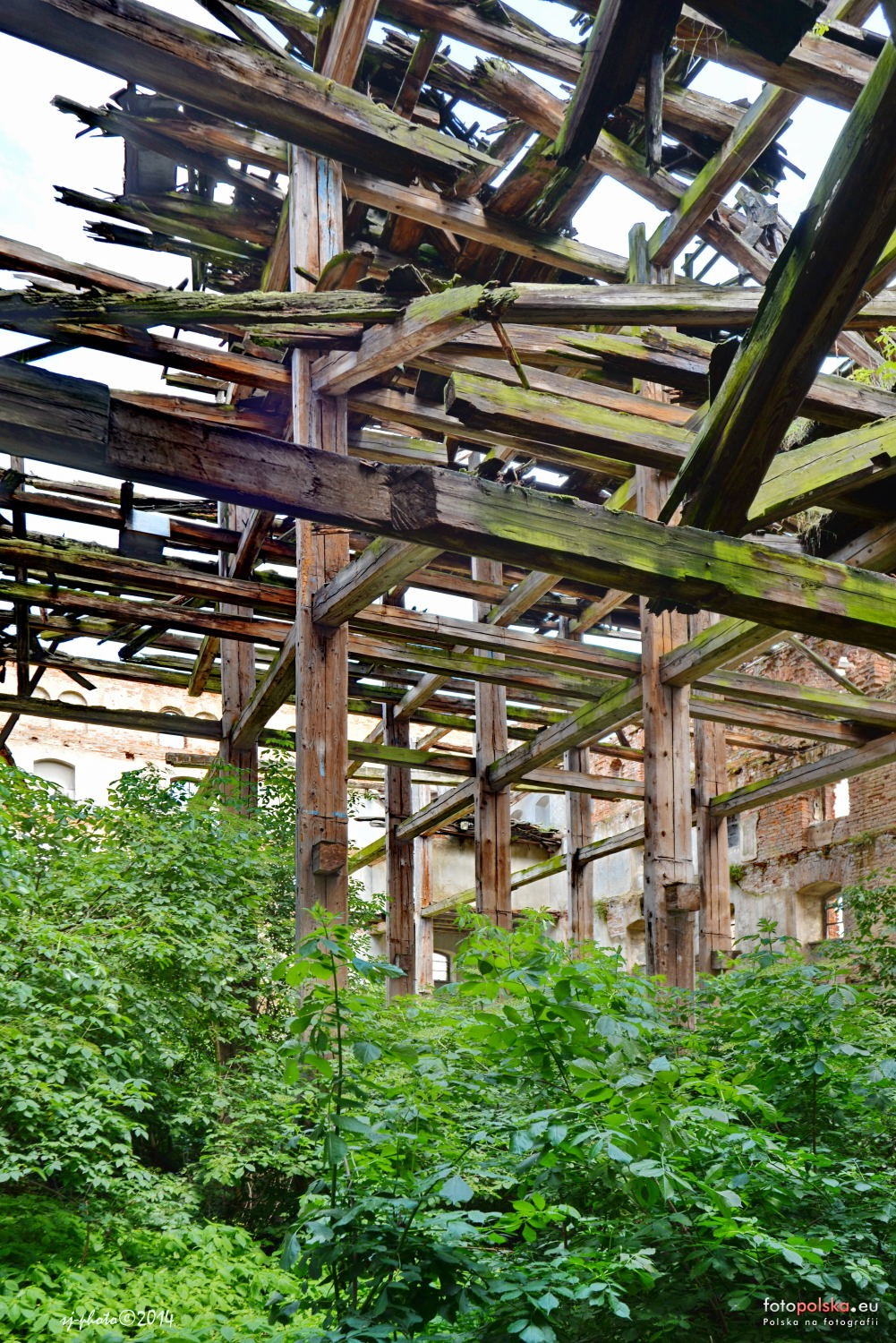 Spichlerz